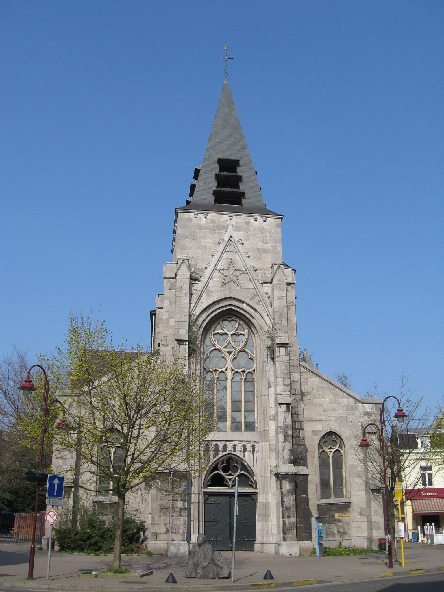 Sint-Lambertuskerk te Jemeppe-sur-Meuse, Seraing